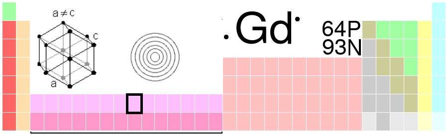 Գադոլինիում.